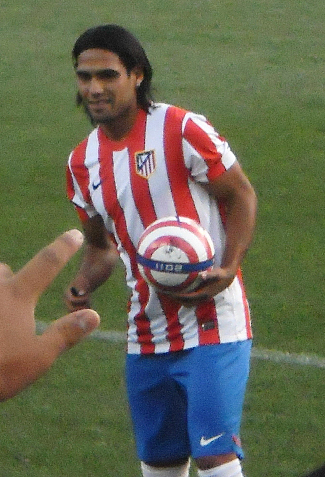 Presentación Falcao Atleti. Totalmente tomada por mi!